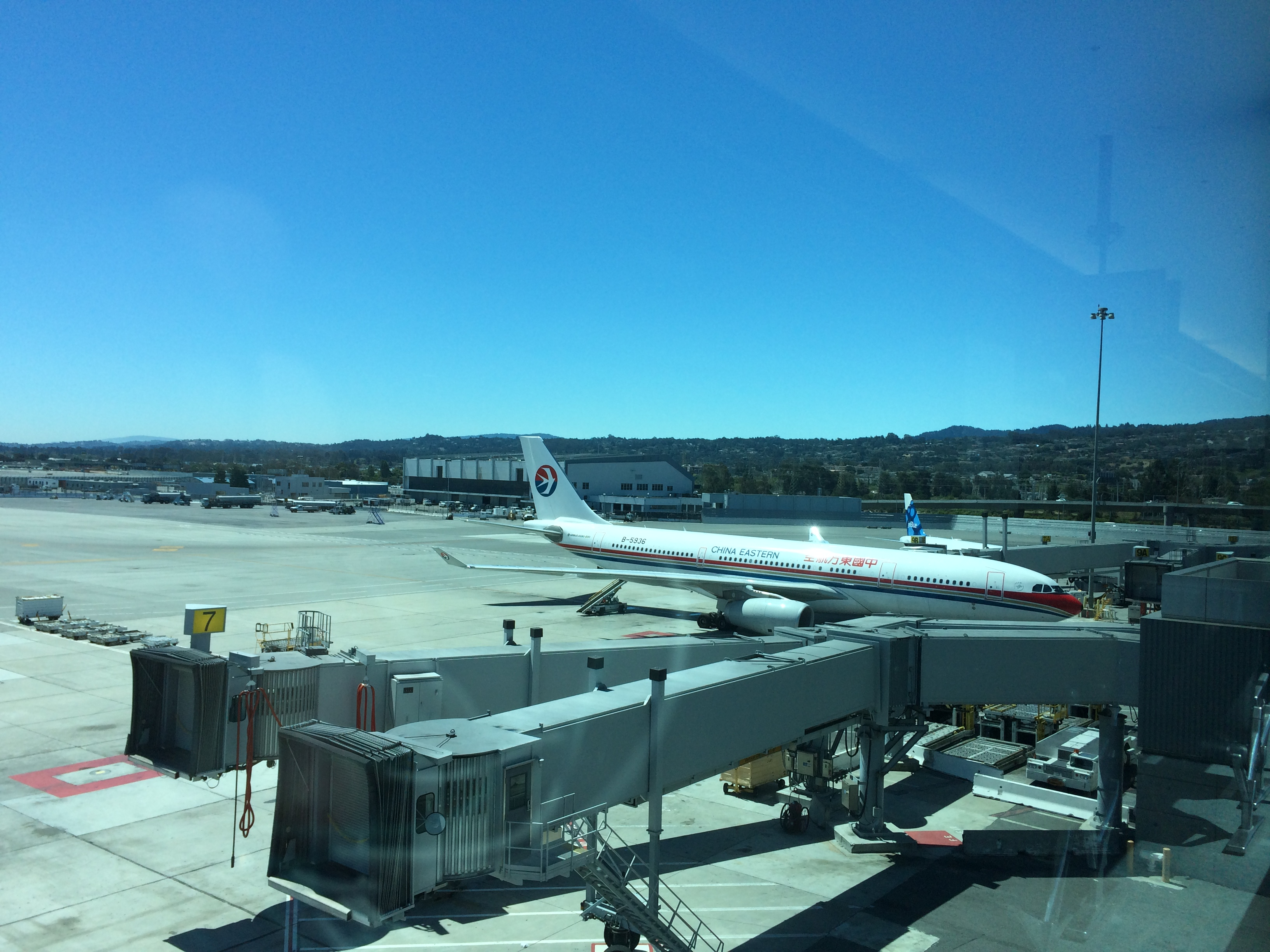 Airbus A330-200 de China Eastern en el Aeropuerto Internacional de San Francisco.